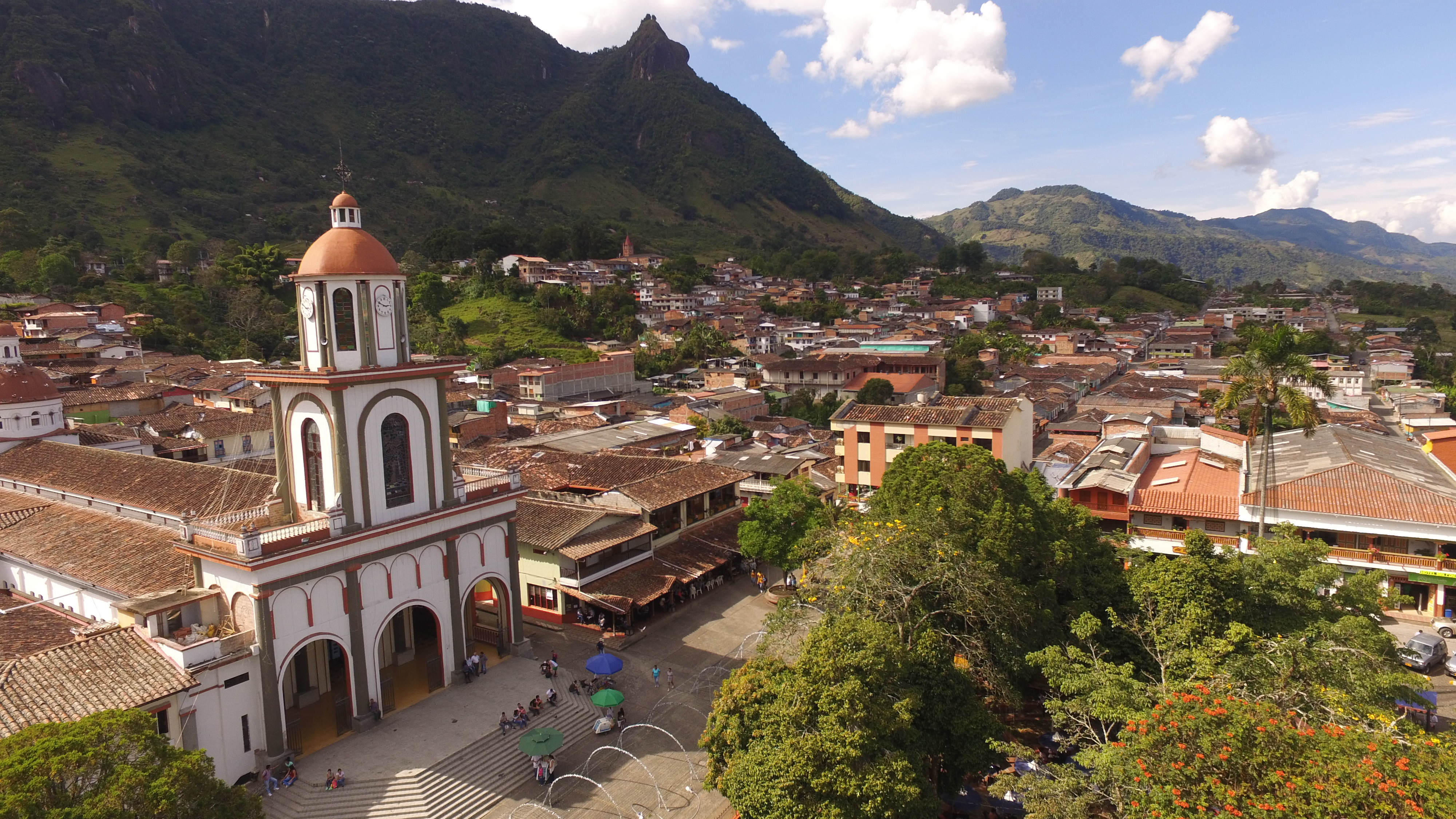 Támesis (Antioquia, Colombia), "La tierra del siempre volver"